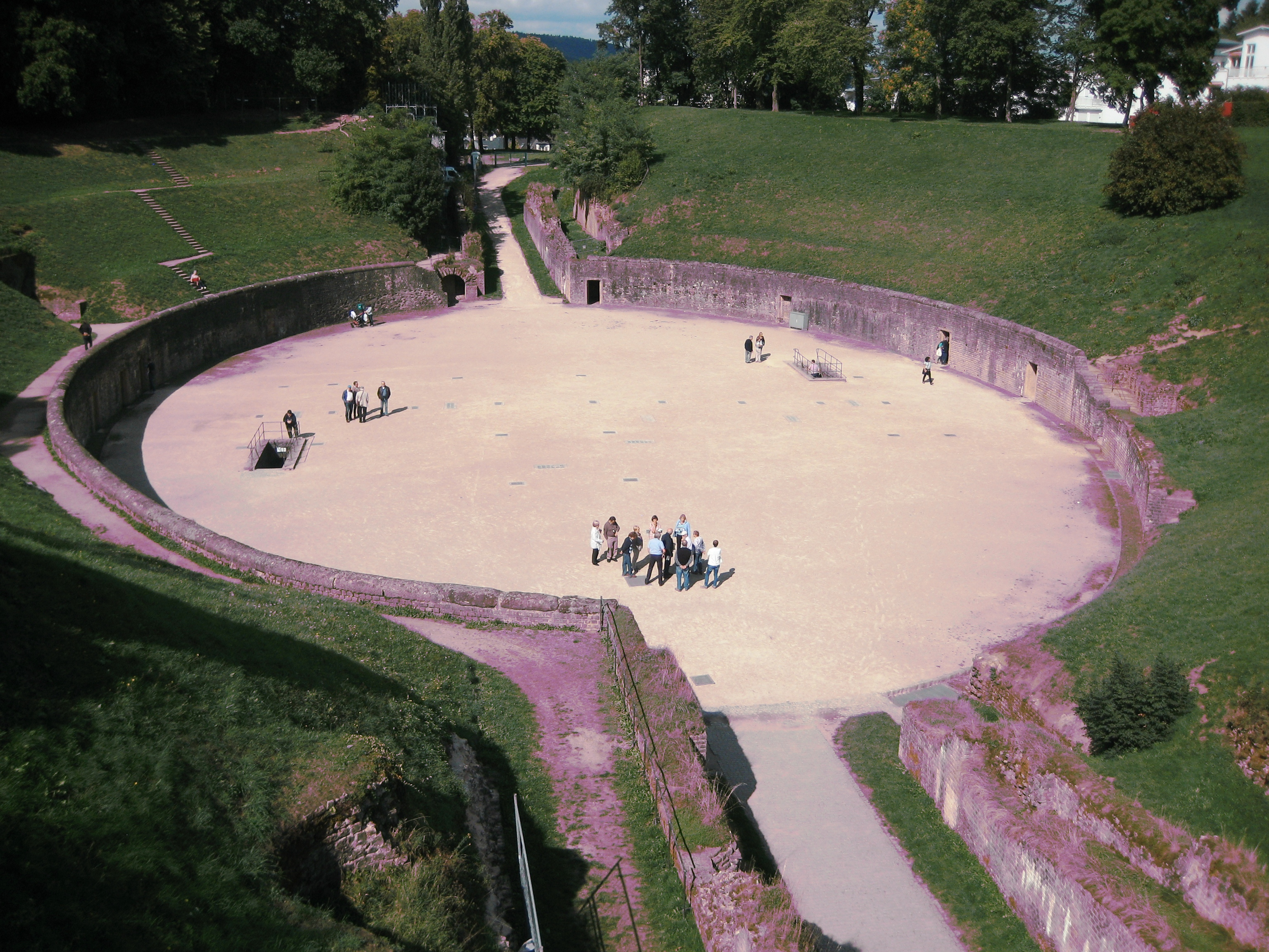 Amphitheater Trier